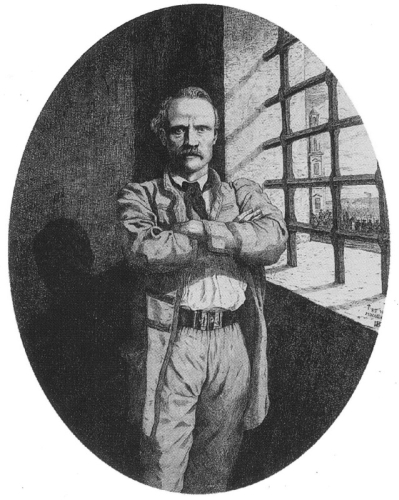 Зыгмунт Серакоўскі ў вязніцы